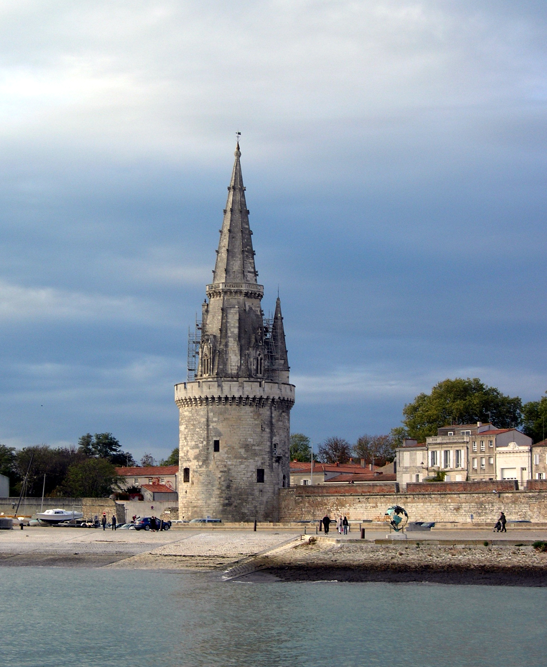 Description = Vieux-port de la Rochelle Source =Photo taken by Remi Jouan Date =Novembre 2005 Author =Remi Jouan